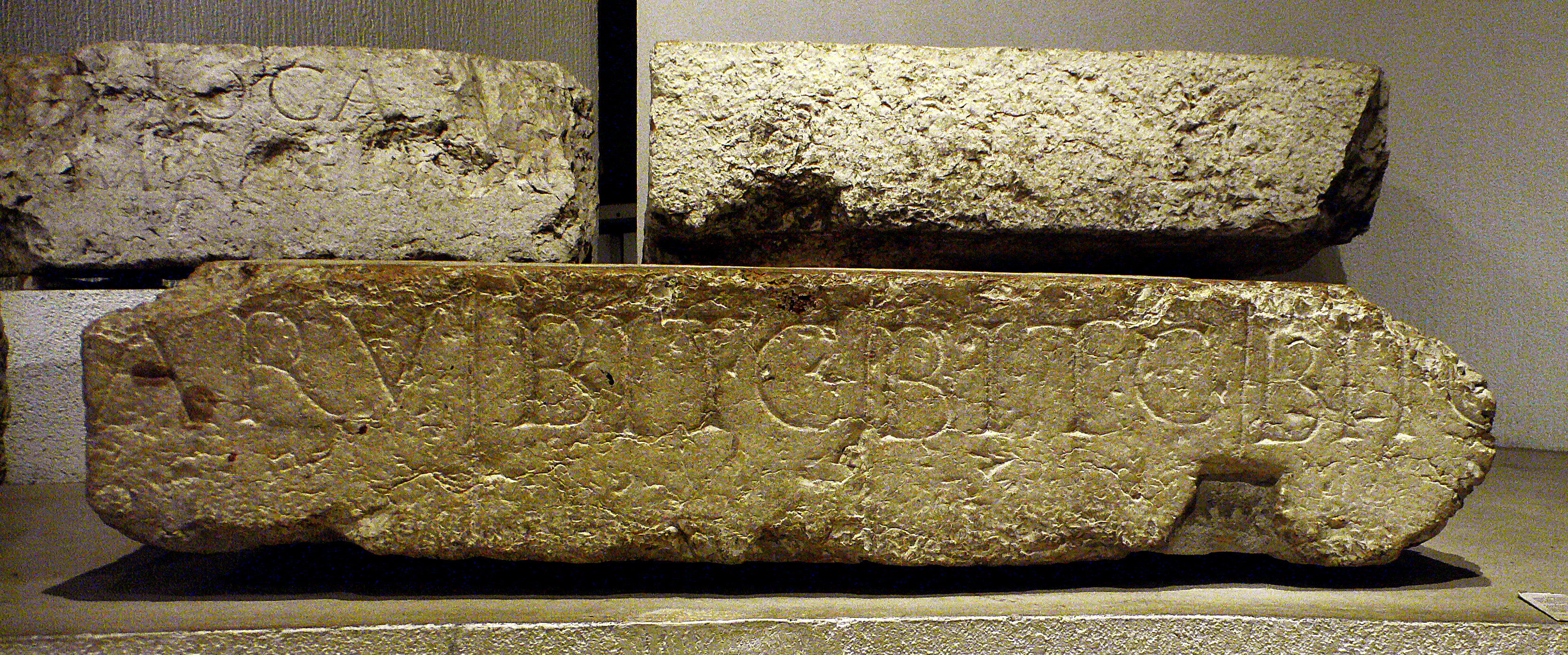 Musée gallo-romain de Fourvière (Lyon) - A l'arrière-plan : Un bloc retrouvé près de l'entrée nord de l'amphithéâtre : Loca [---] Macedo(num) = AE 2000, 940. Au premier plan : un des deux ou trois fragments d'un bloc. Gradin de l'amphithéâtre des Trois Gaules à Lyon portant la mention : [...] ARV(ernis) / BIT(urigibus) C(ubis) : places réservées pour les Arvernes et les Bituriges Cubes. (CIL XIII 1667a)